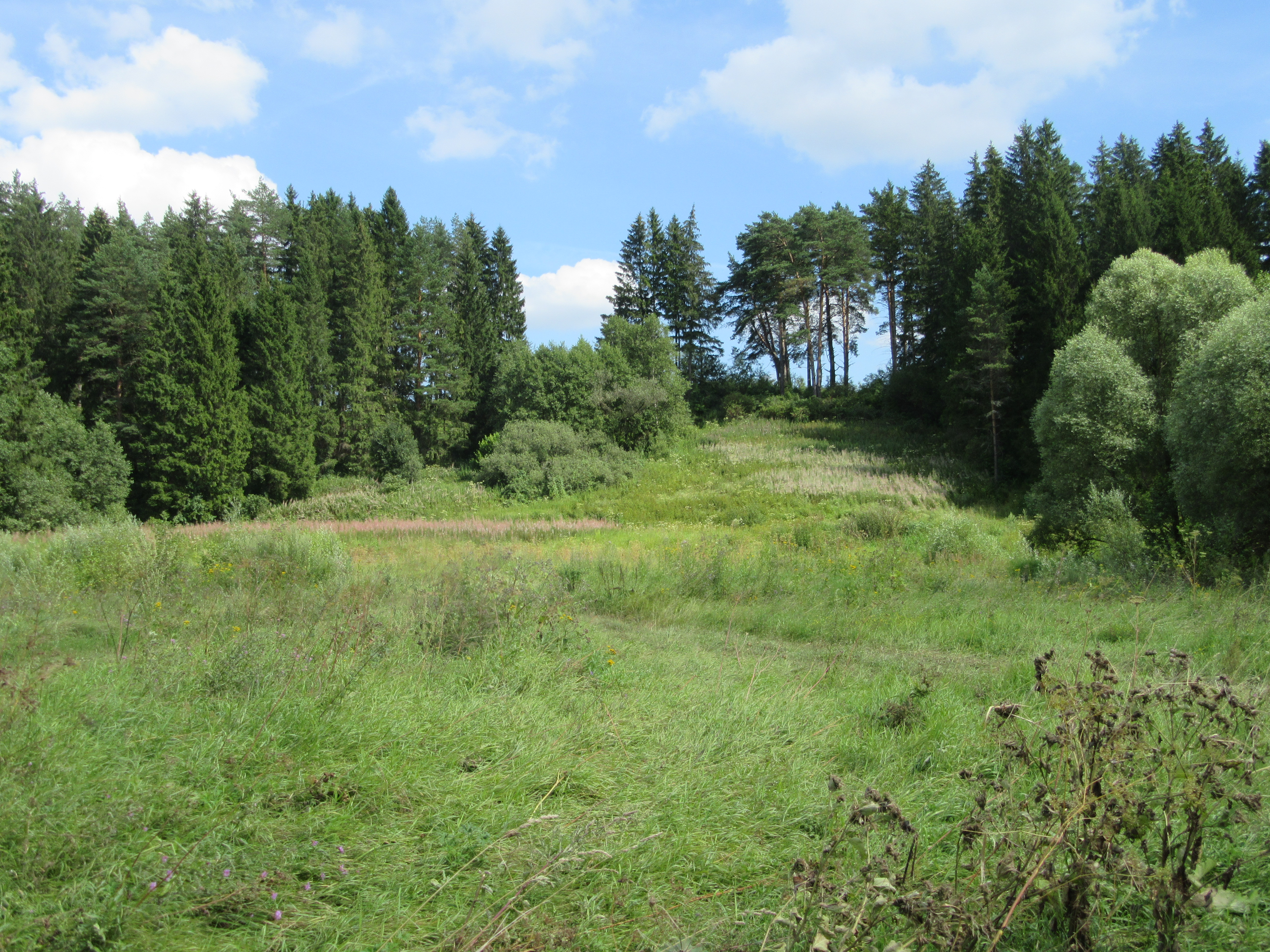 Характерная растительность. Медынский район Калужской области